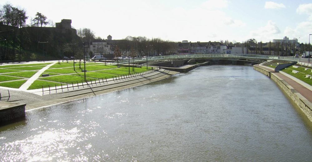 Le fleuve La Vire dans la ville de Saint-Lô avec la vue sur la plage verte et les remparts de la ville